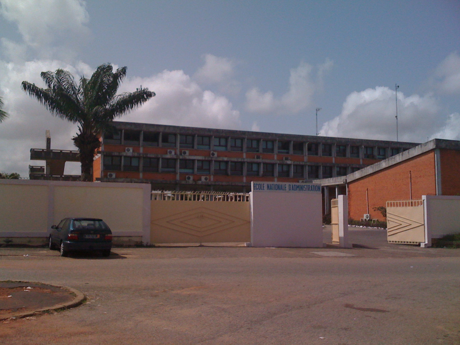 Façade principale de l'École nationale d'administration (ÉNA) d'Abidjan (Côte d'Ivoire)